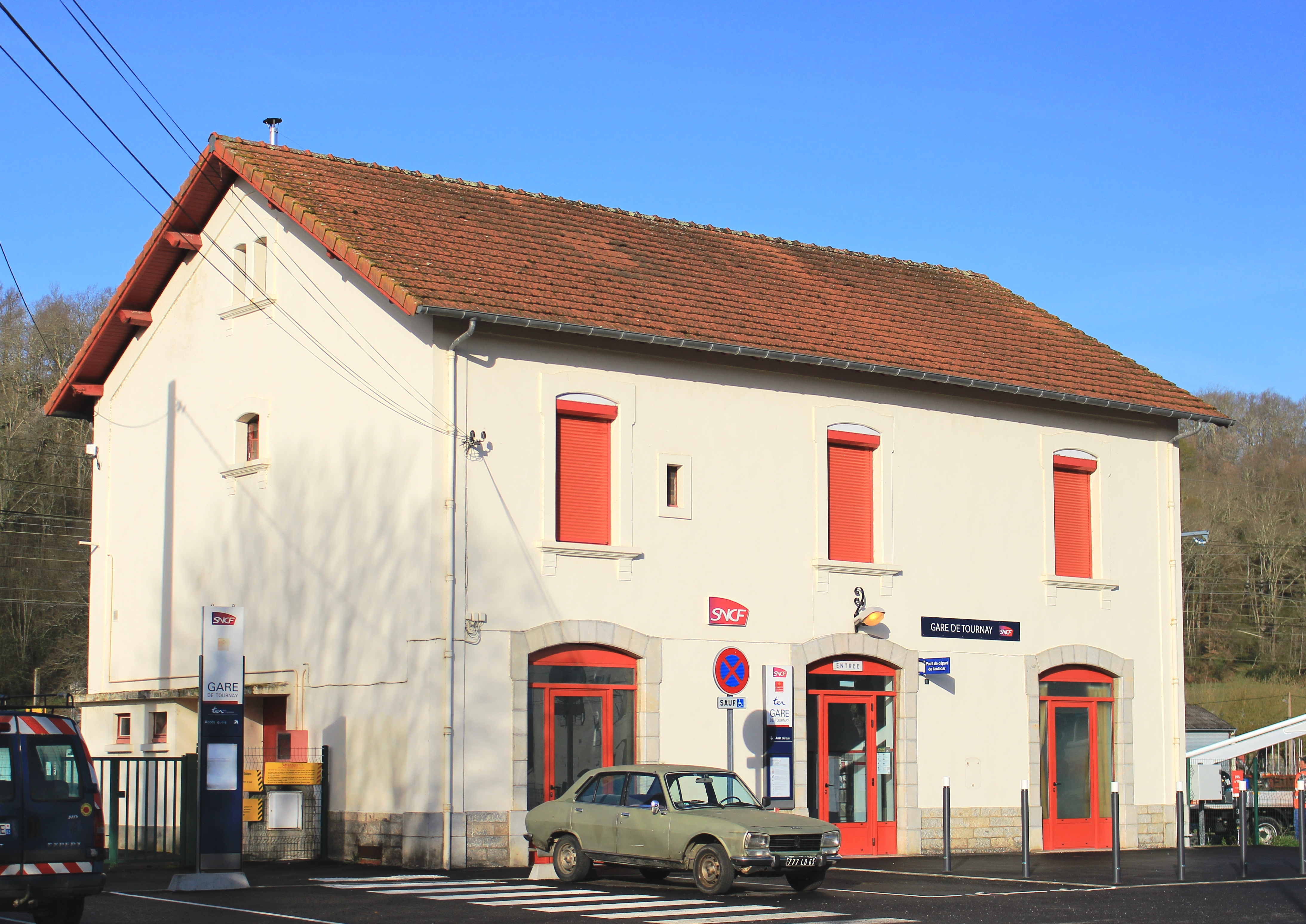 Gare de Tournay (Hautes-Pyrénées)